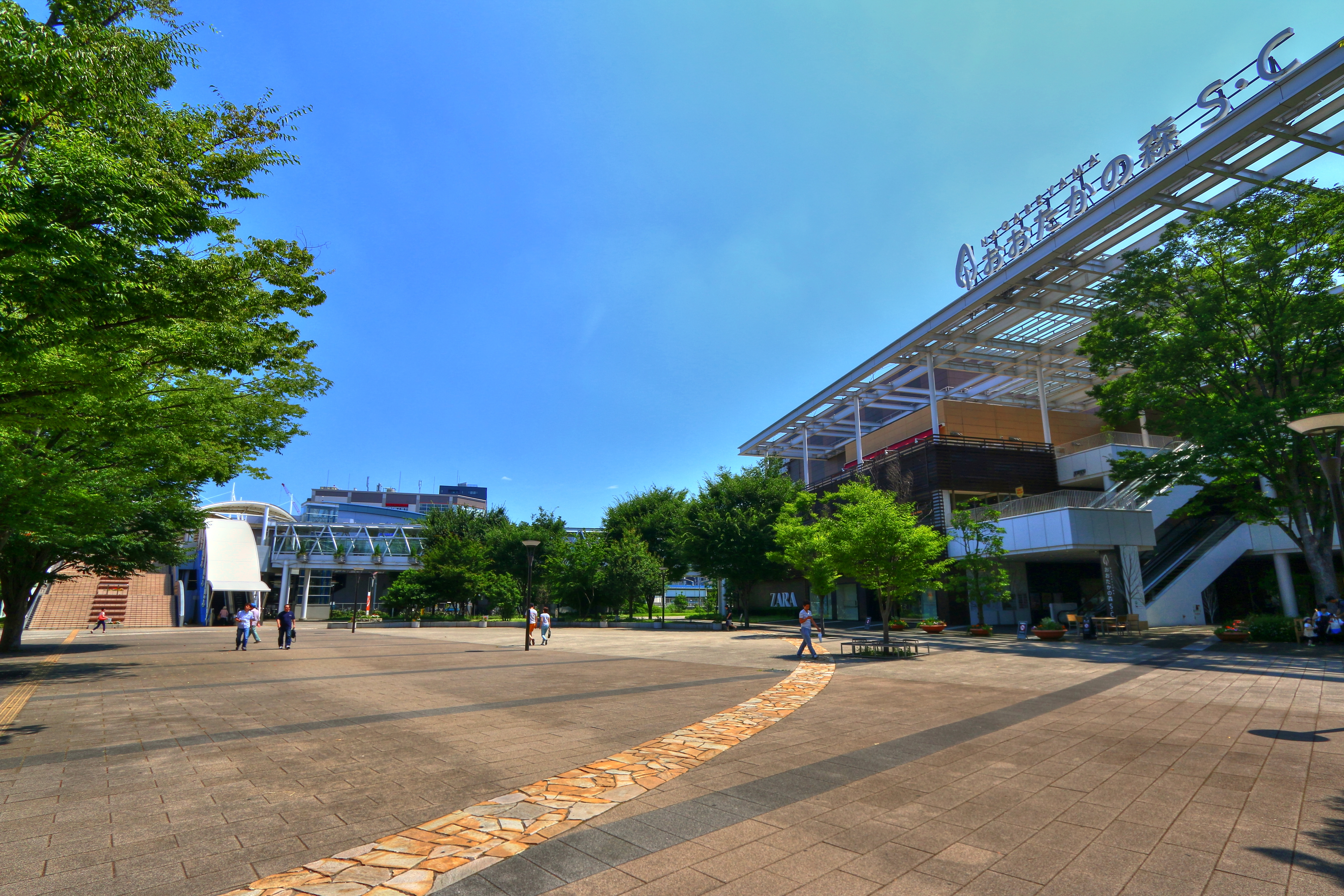 おおたかの森SC